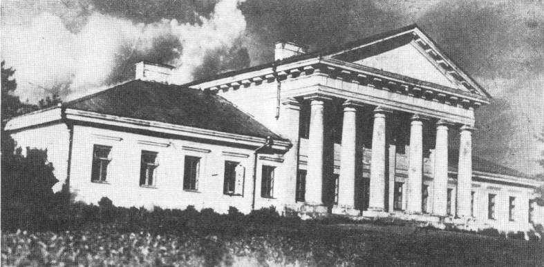 Diktariškių dvaro rūmai apie 1939 m. iš šiaurės vakarų pusės